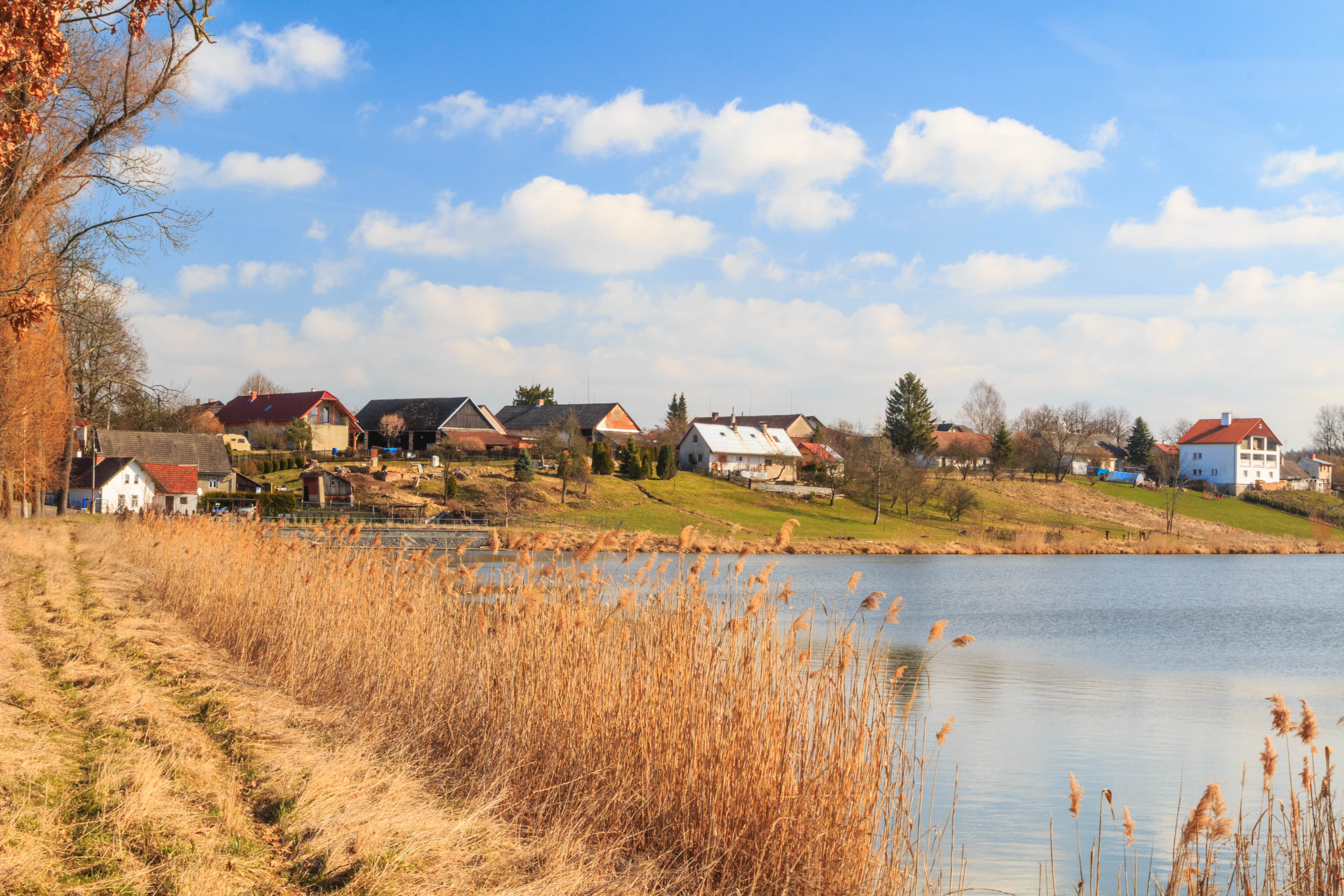 Zdelov - Zdelovský rybník